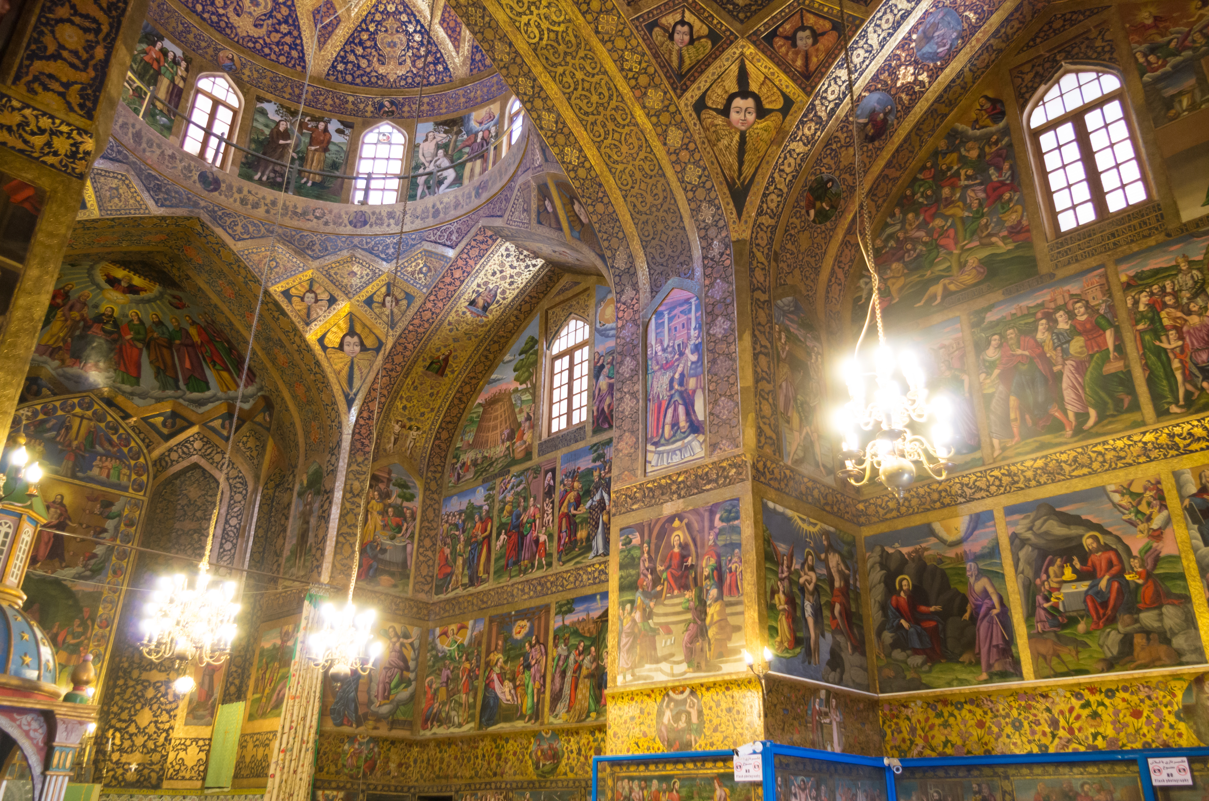 Cathédrale Saint-Sauveur d'Ispahan